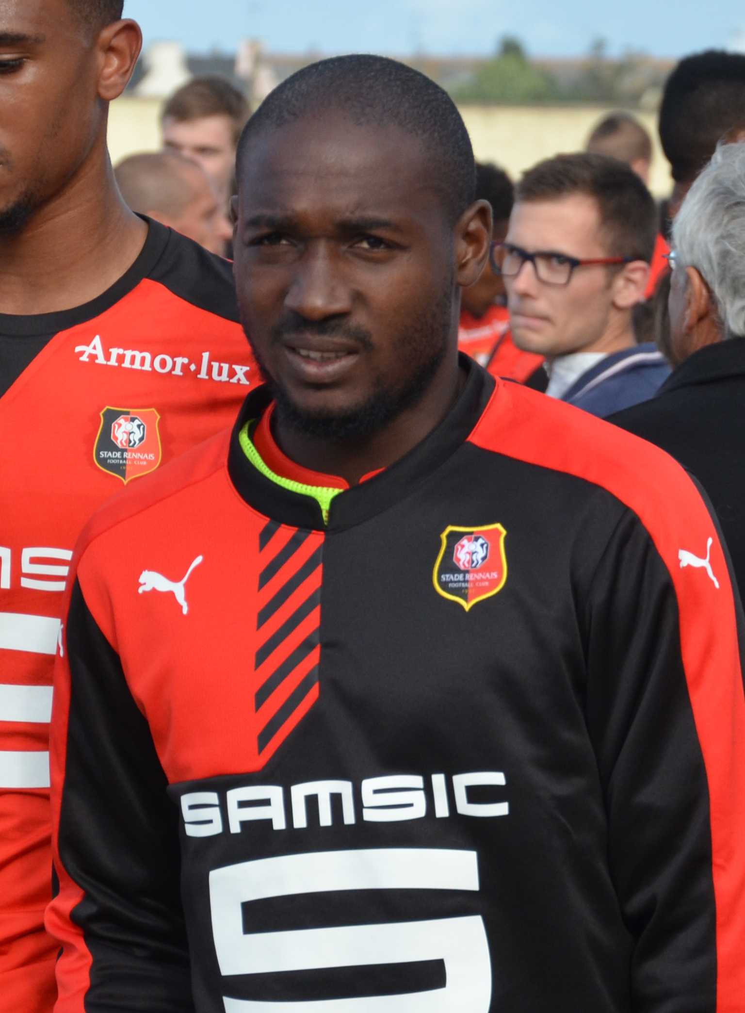 Photographie prise lors du match opposant le Stade rennais au Havre AC en amical au stade Paul-Audrin de Dinard le 8 juillet 2015. Ici, Giovanni Sio.